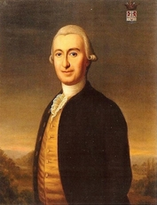 Scan eines alten Familienporträts von André Joseph de Grand Ry (1744-1801), Bürgermeister von Eupen